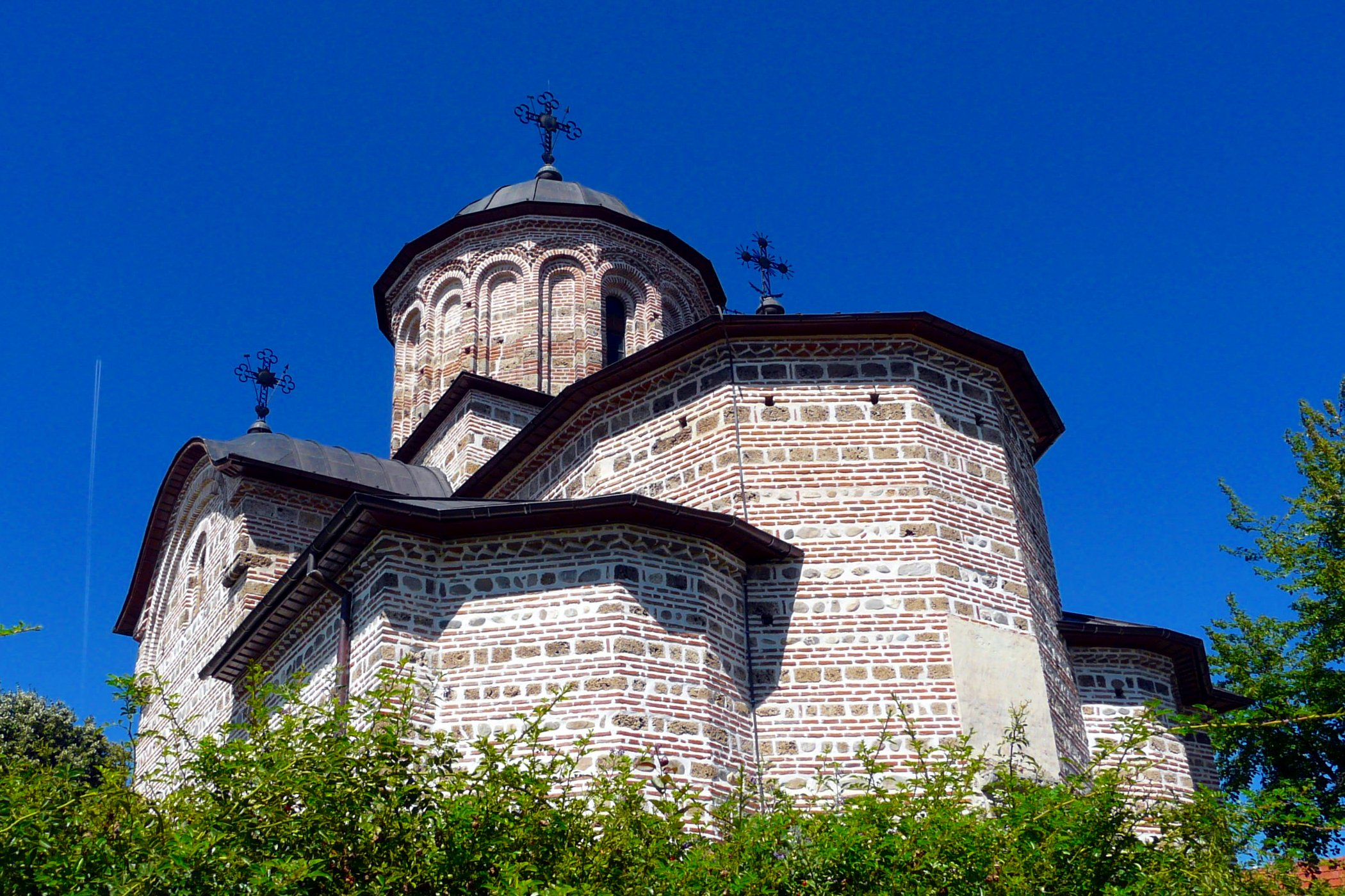 Église royale saint Nicolas de Curtea de Arges 01